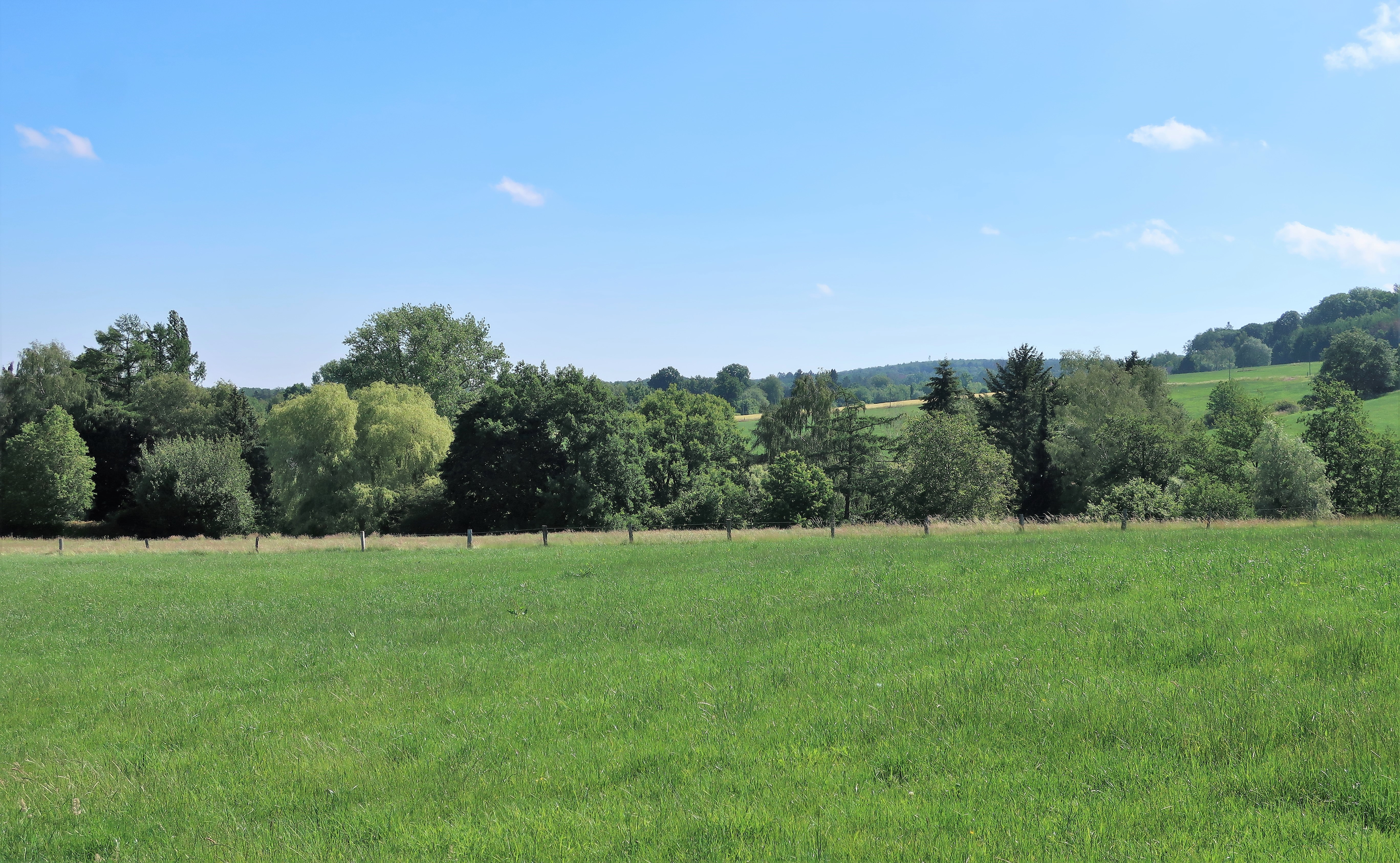 Geschützter Landschaftsbestandteil 1.4.2.28 „Elsebachgrund“ in Hagen-Berchum südlich von Tiefendorf. Es handelt sich um Feuchtweide, die vom Elsebach durchflossen wird. Am nördlichen Ende befinden sich Kopfweiden, im Süden ein Erlenbestand.